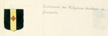 blason monastère Saint-Yves Guérande